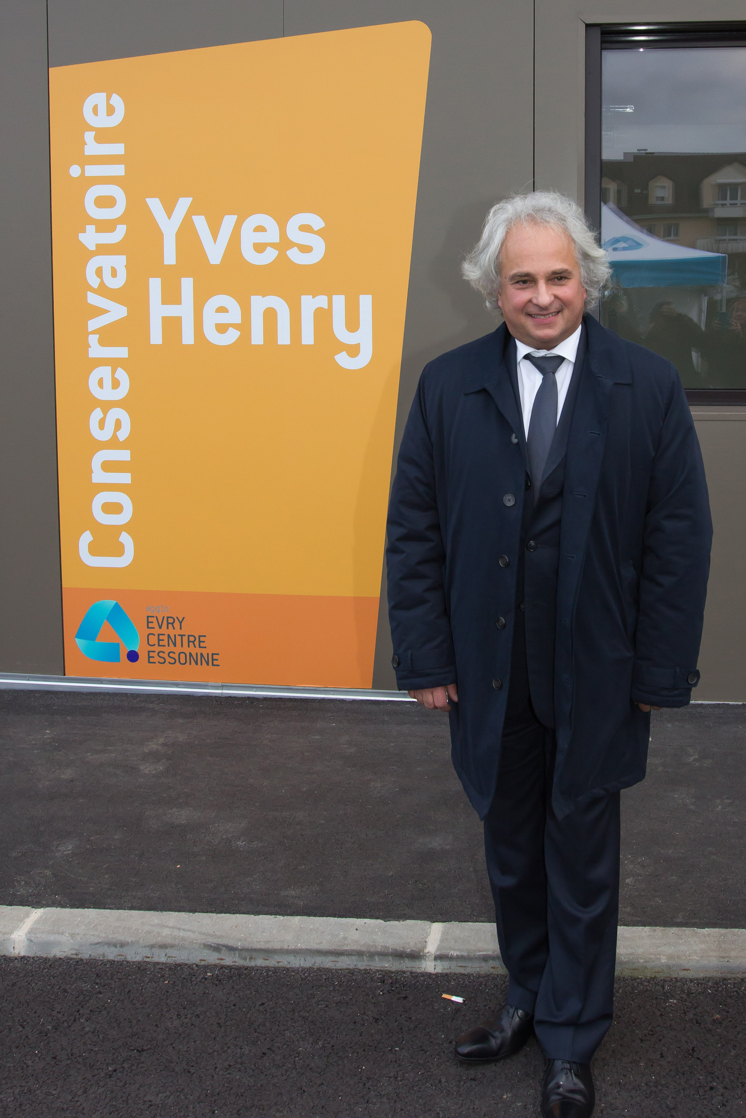 Yves Henry, musicien / Inauguration du conservatoire Yves Henry de Villabé / Villabé / Essonne / France